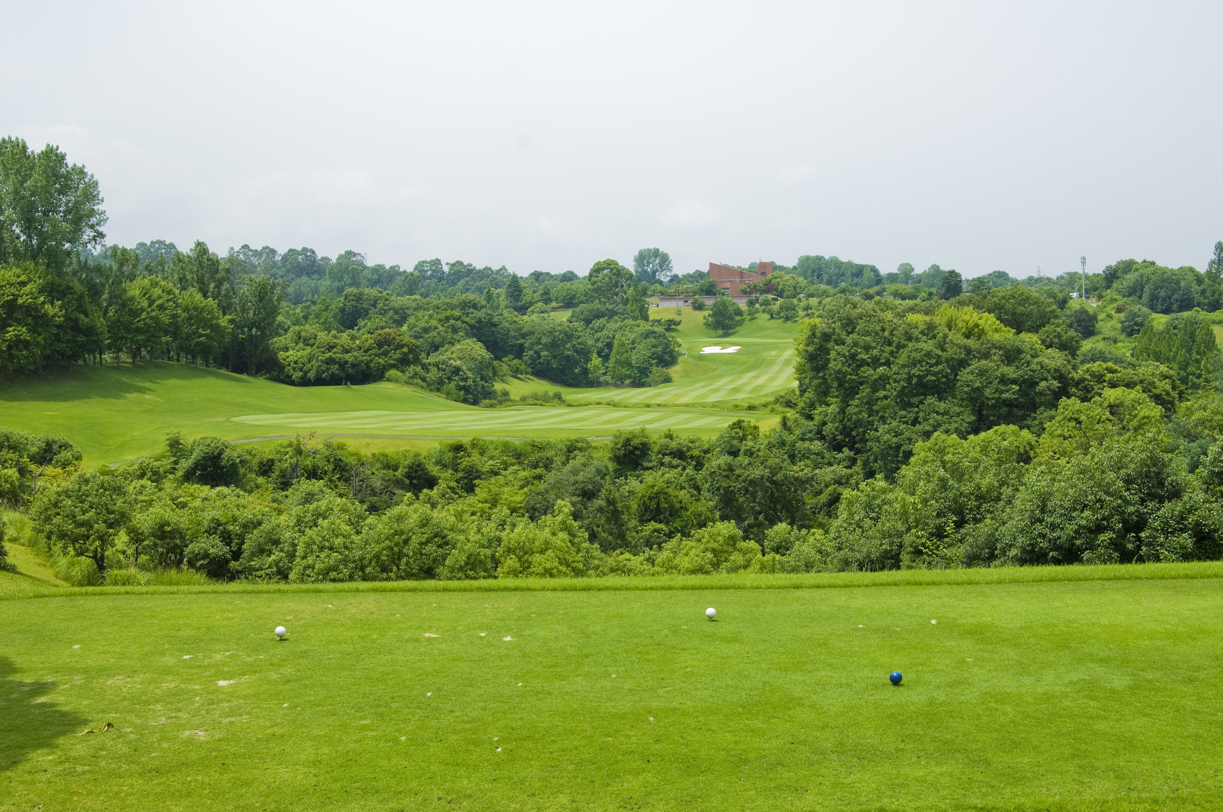 葛城9番ロングは、ティーショット、セカンドショットともに谷越えとなる、名物ホールです。